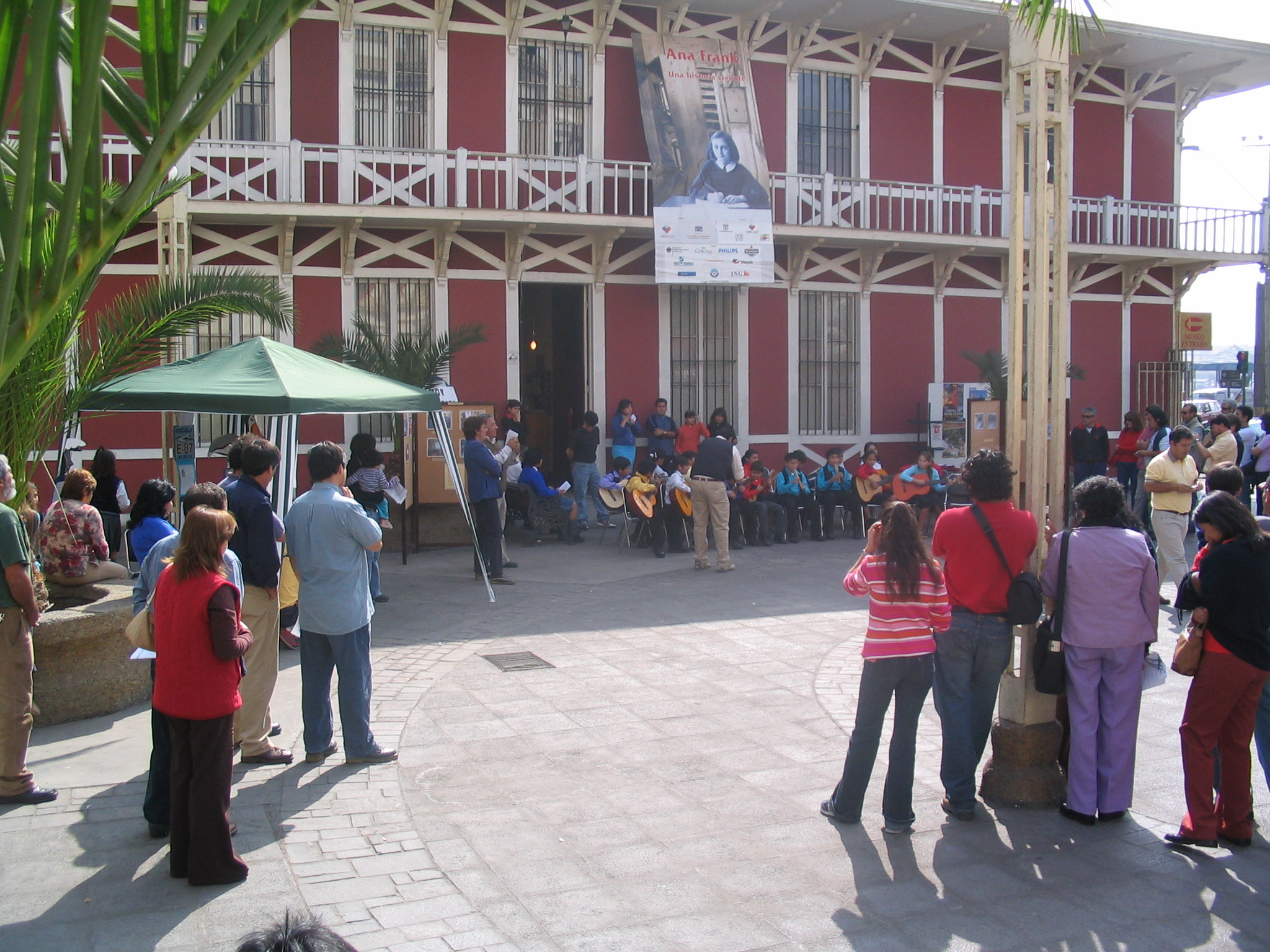 Museo Regional de Antofagasta, Chile. Celebración del día del Patrimonio Cultural.